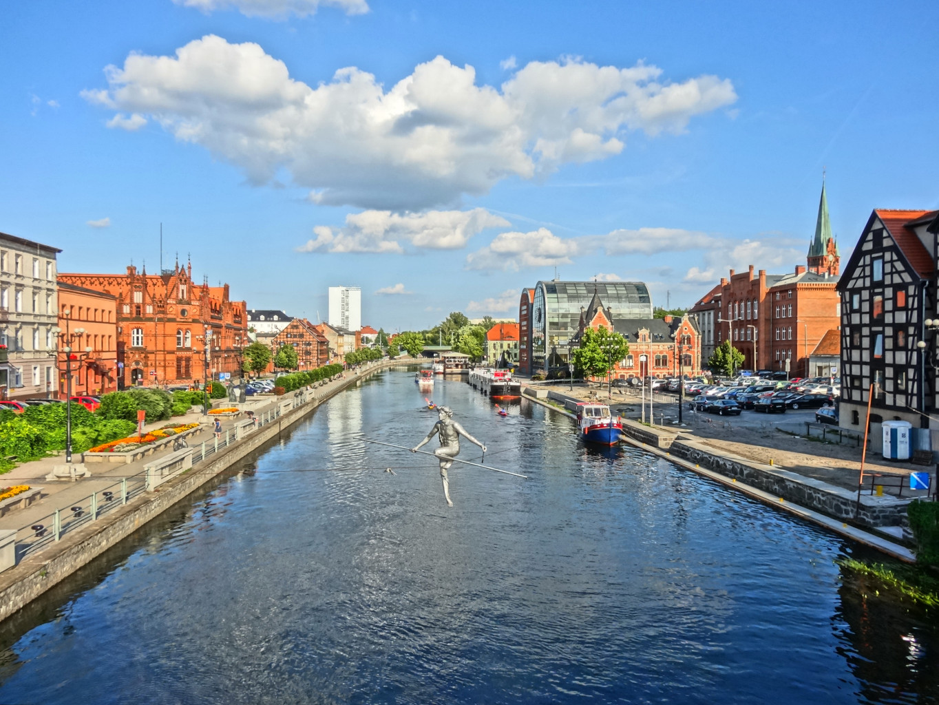 Widok z mostu Staromiejskiego im. Jerzego Sulimy-Kamińskiego w Bydgoszczy